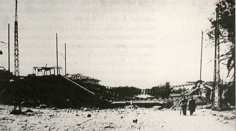 Ponti di Anderlino abbattuti con il binario fluttuante con resti di linea aerea.